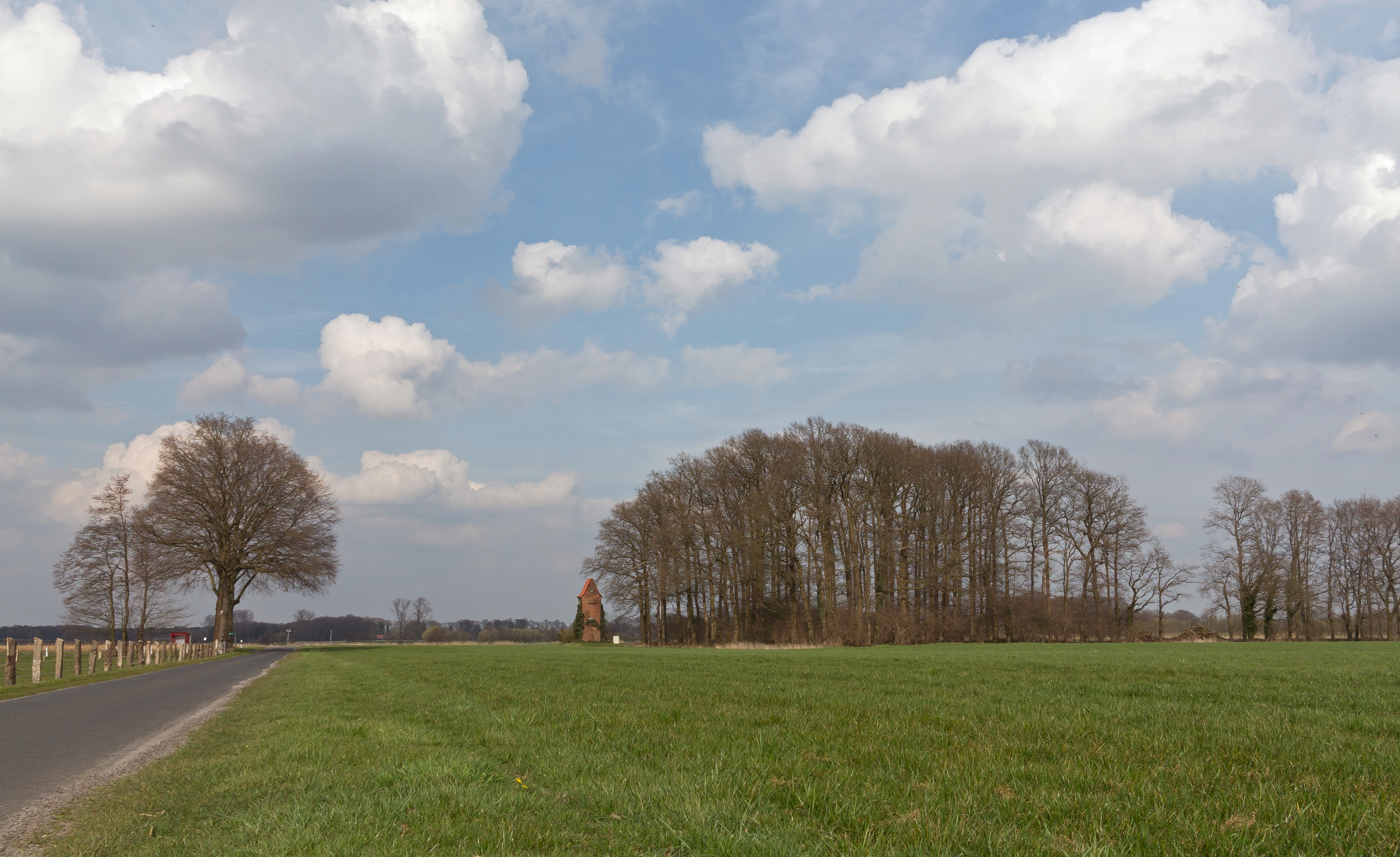 Brinkerhook, Blick auf den Ort